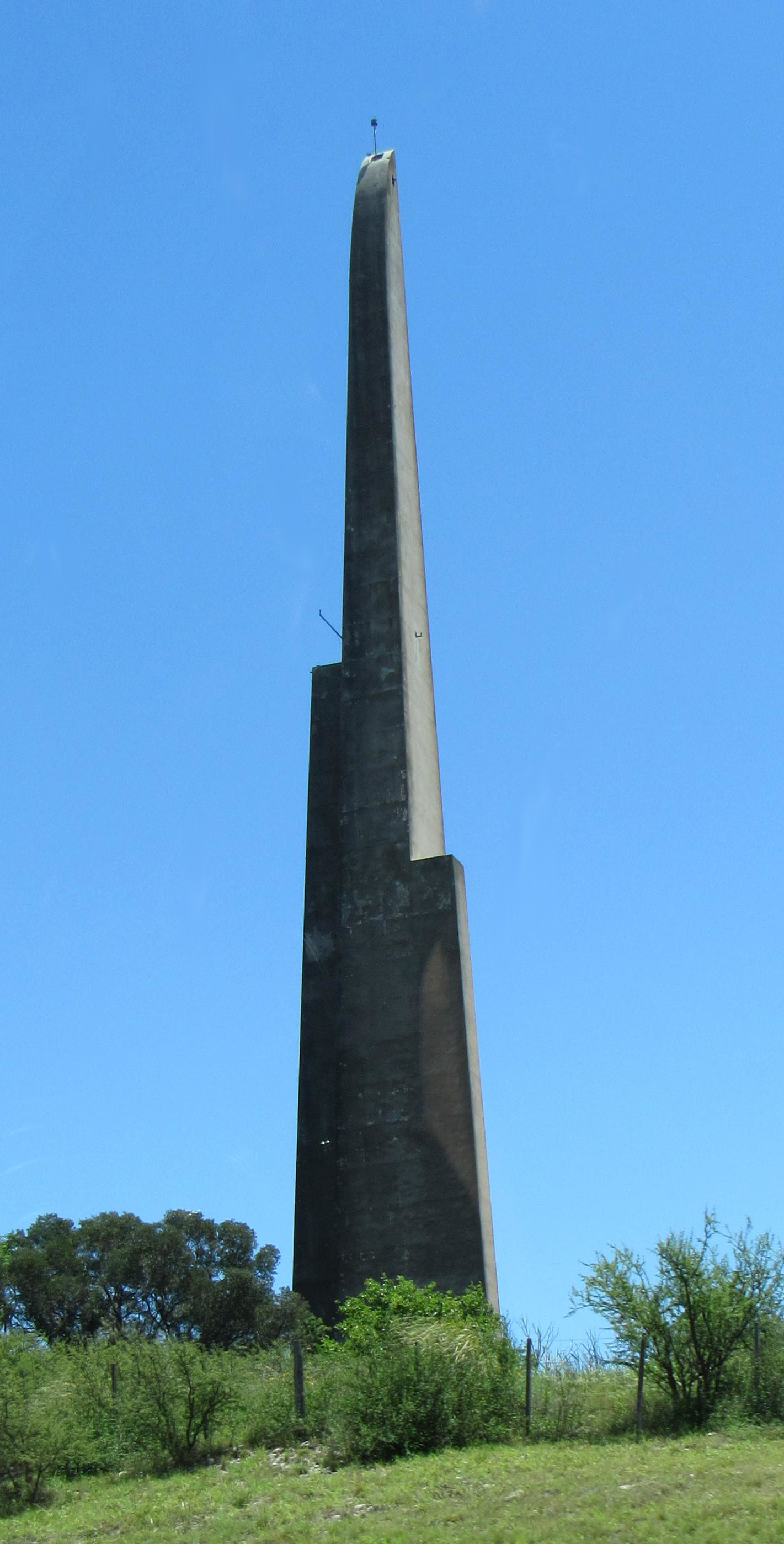 Mausoleo de Myriam Stefford, desde la Autovía Atilio López (Ruta Provincial 5), entre Alta Gracia y Córdoba Capital